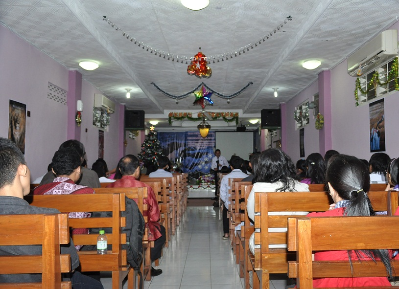 Gereja Pantekosta di Indonesia Kroya